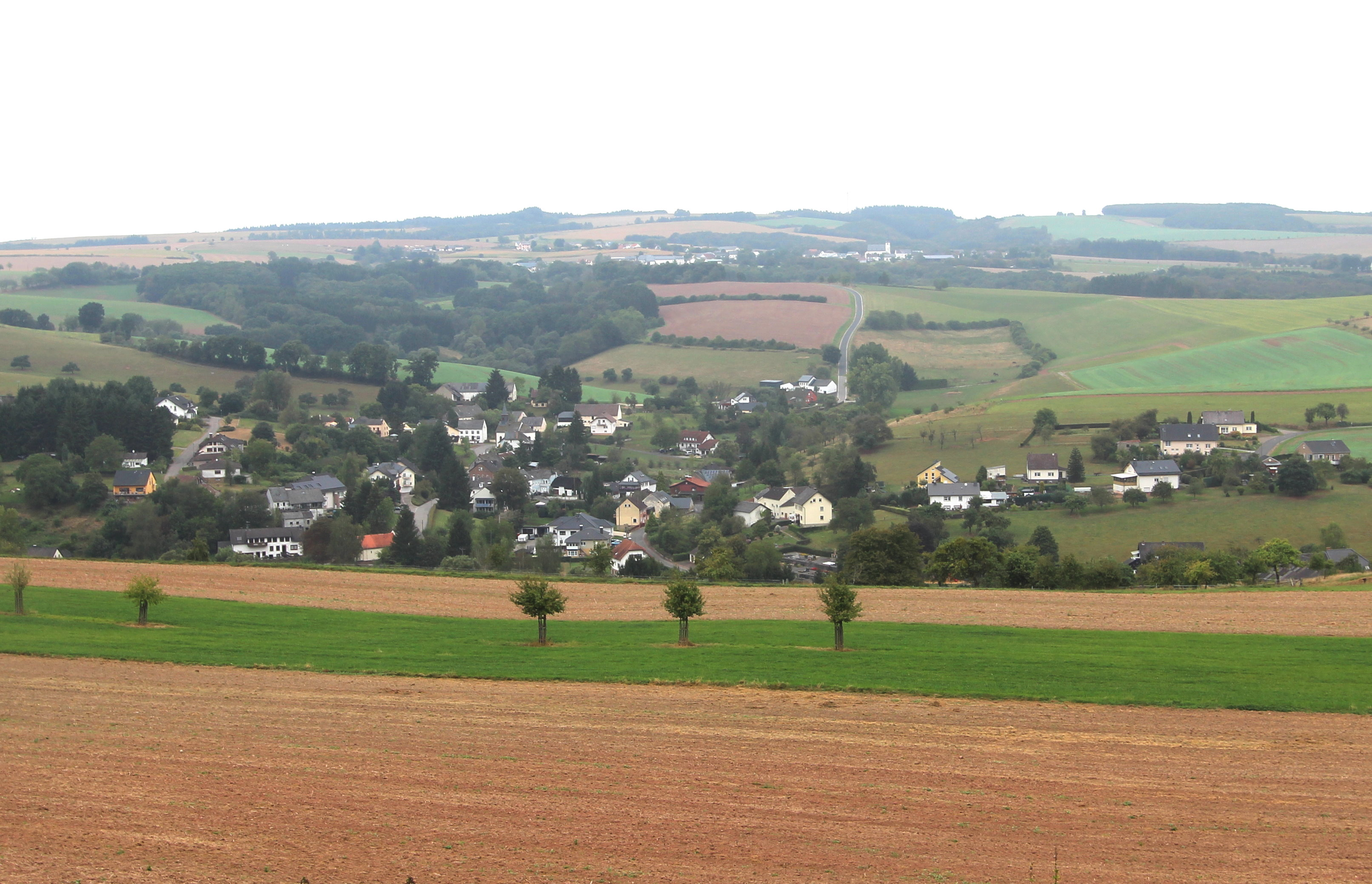 54636 Hütterscheid in der Eifel. Blick auf Hütterscheid (Auf dem Horst). Aufnahme aus Süd-Osten von 2016.